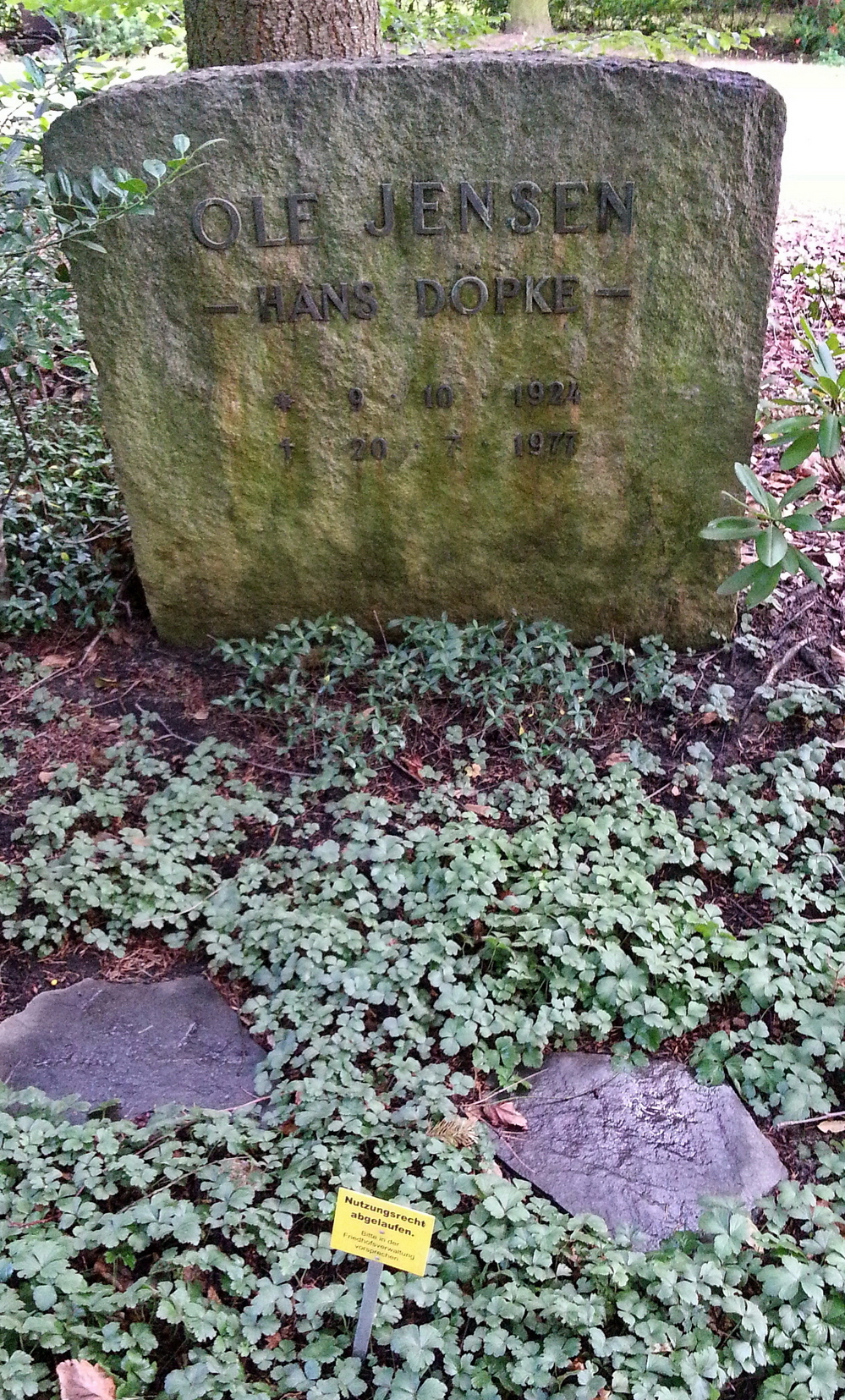 Grab von Ole Jensen auf dem Heidefriedhof in Berlin-Mariendorf Feld F VI - 43/44